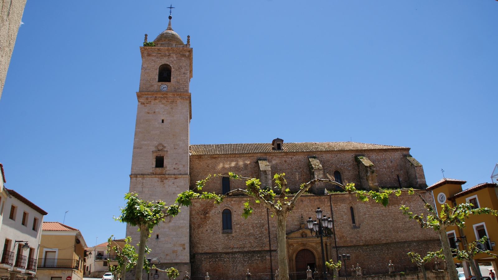 Iglesia Parroquial de Stª María Magdalena, siglo XV, una de las primeras del renacimiento español, Mondéjar, Guadalajara